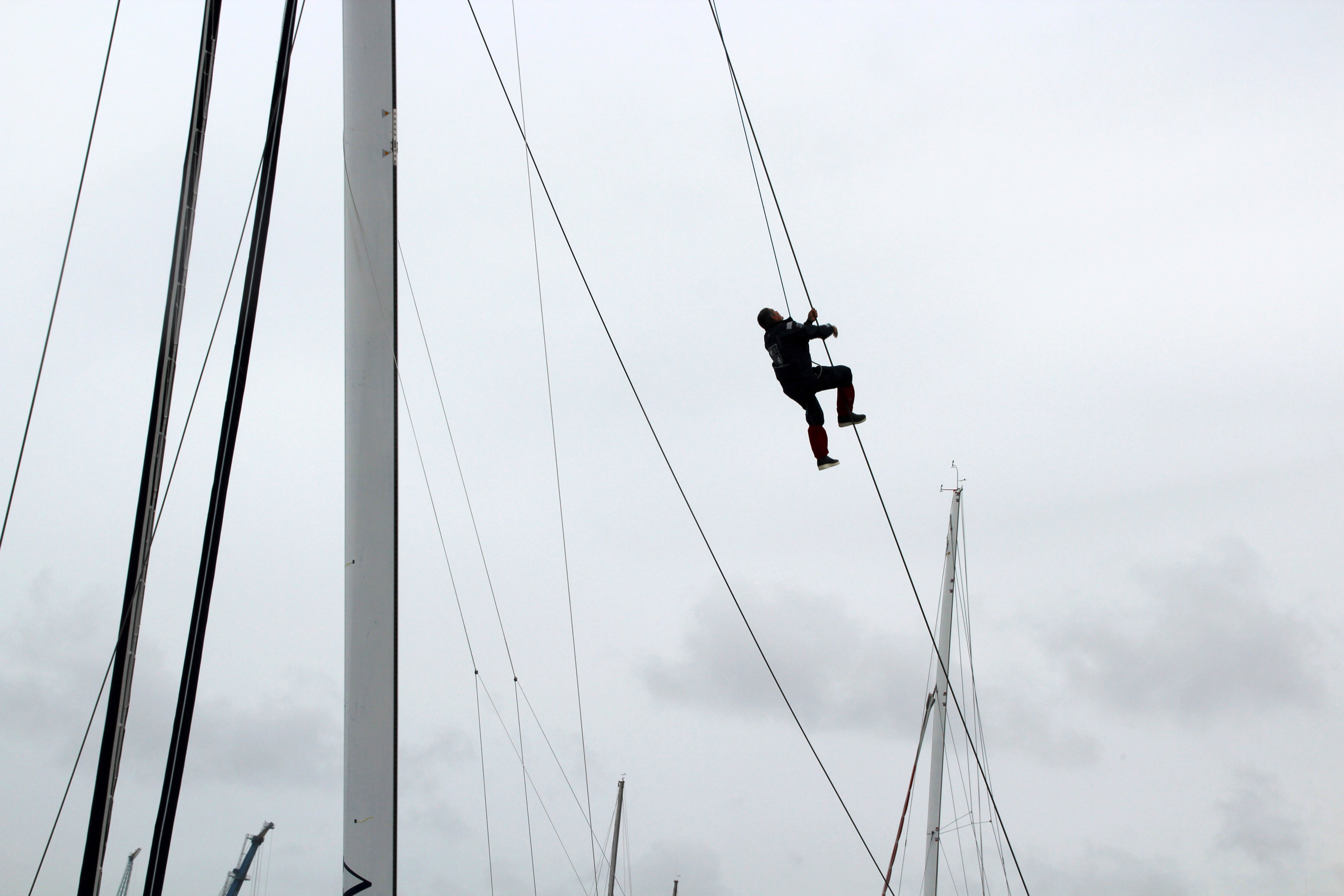 Tonnerres de brest 2012 Krys Ocean Race-Réparatiion acrobatique